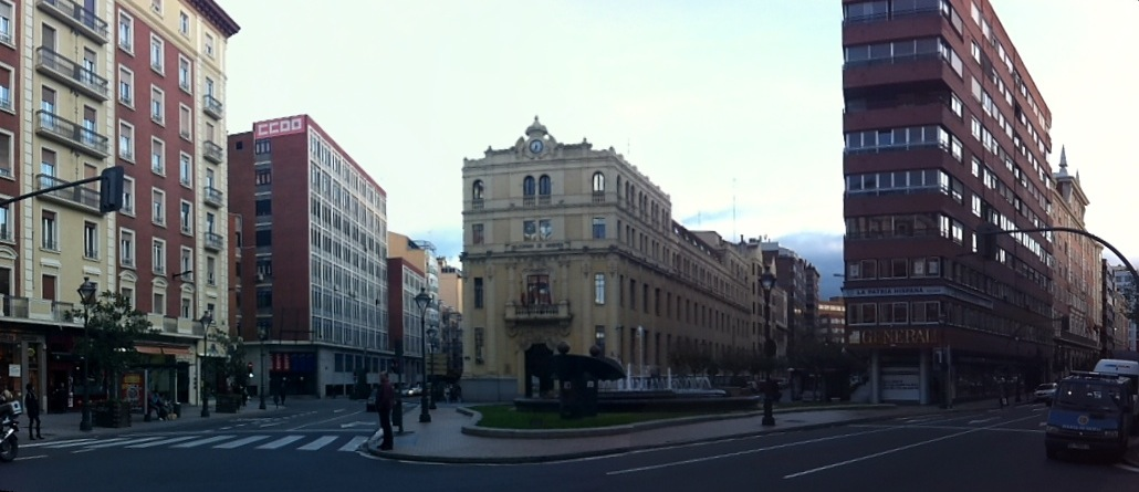 Plaza Madrid en la ciudad de Valladolid, año 2013